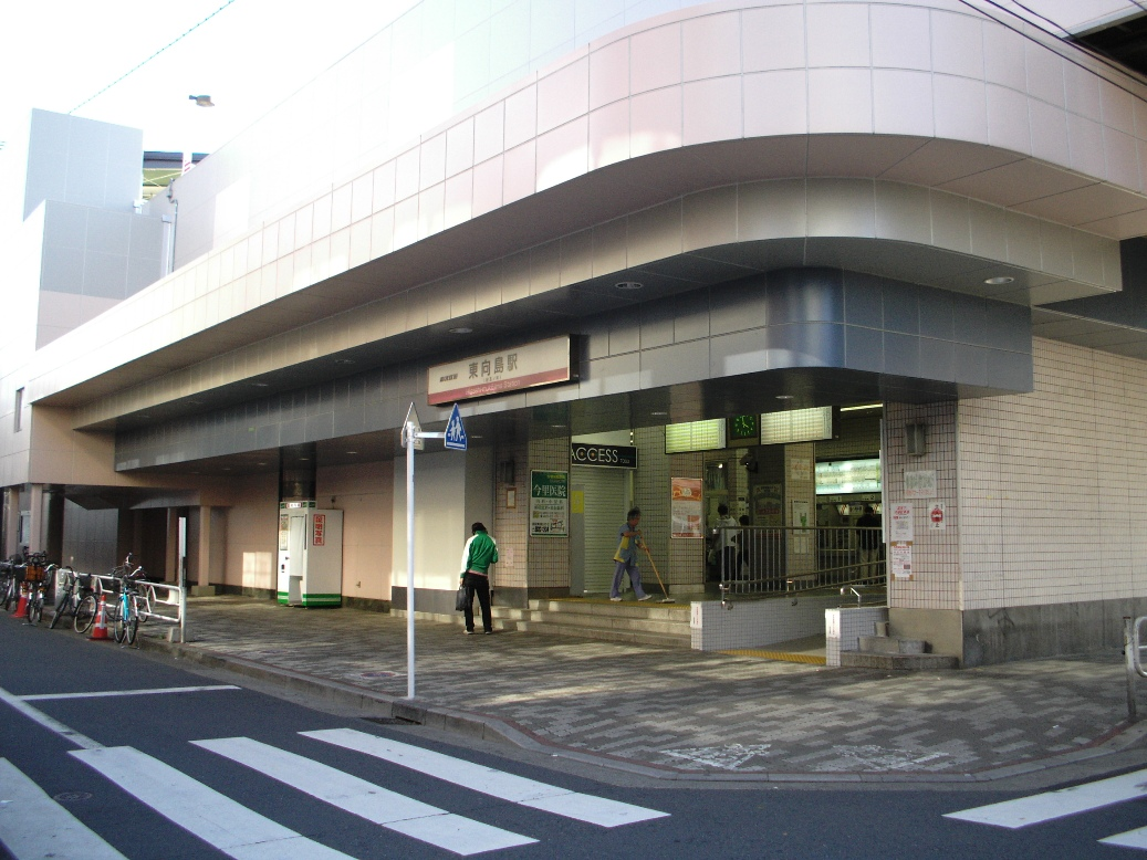 東武鉄道東向島駅